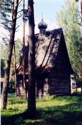 Egy Latgale tartományból származó templom a rigai skanzenben (Lettország)